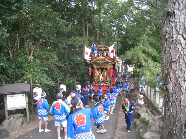 矢作神社秋の大祭（愛知県岡崎市矢作町）